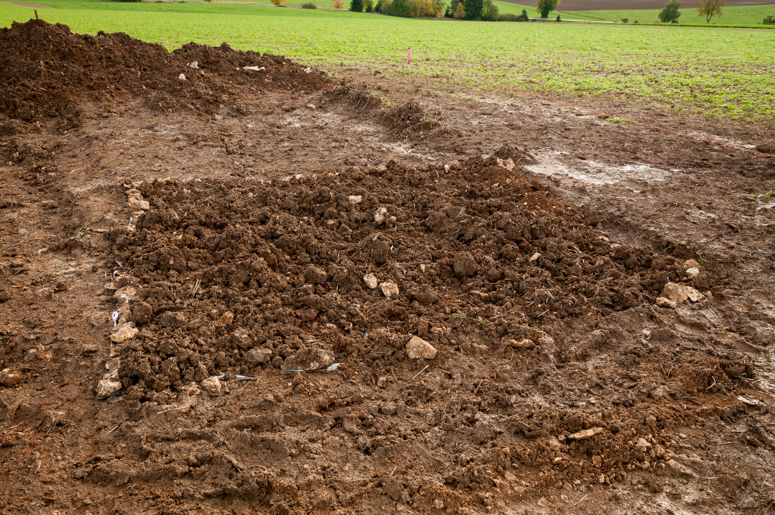 Die Freilandstation Börslingen im Alb-Donau-Kreis, Baden-Württemberg.